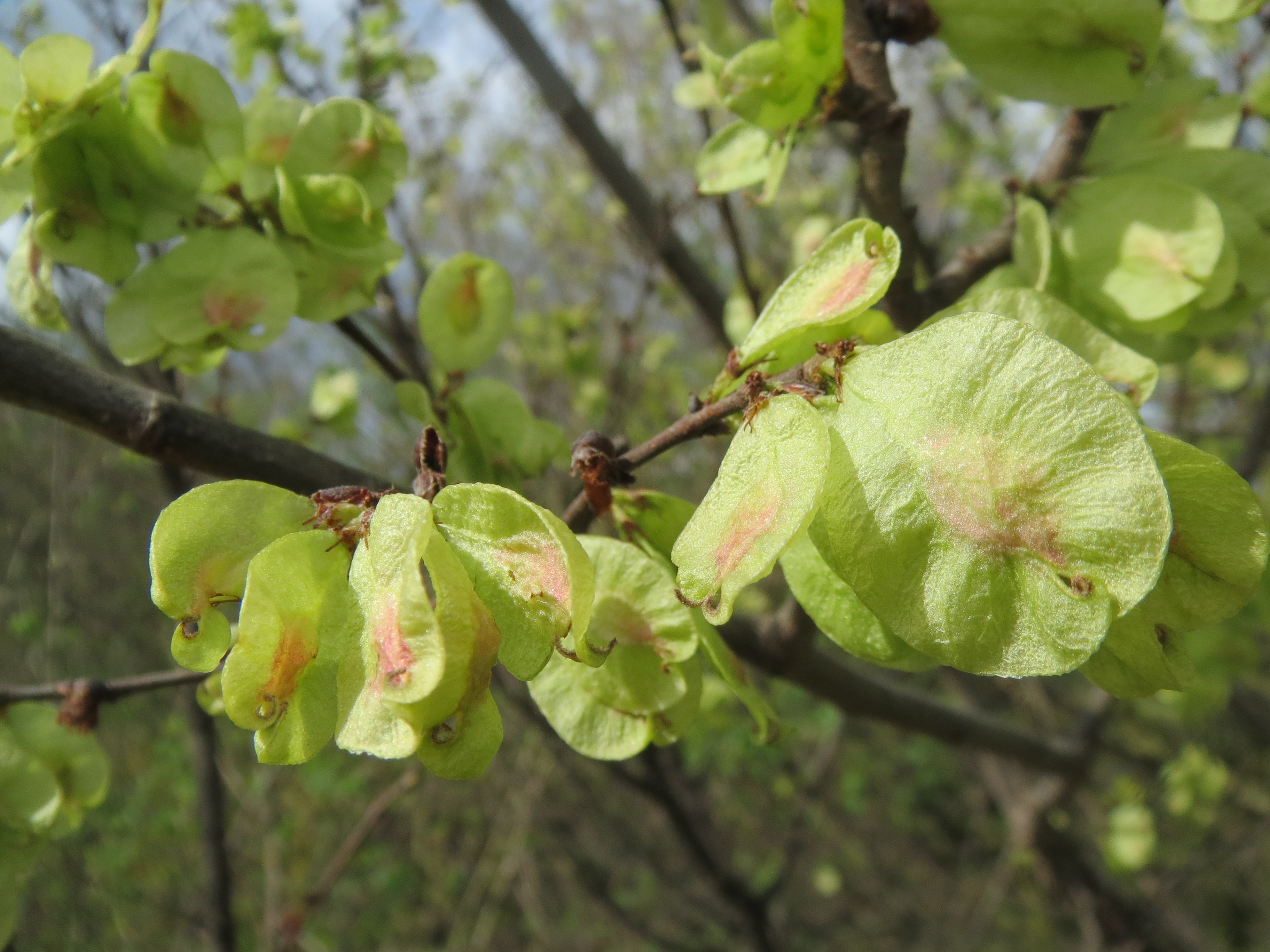 Feldulme (Ulmus minor) bei Neulußheim